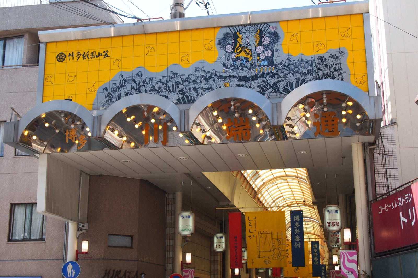 福岡市博多区にある「川端通商店街」（櫛田神社寄り）南東端の入り口